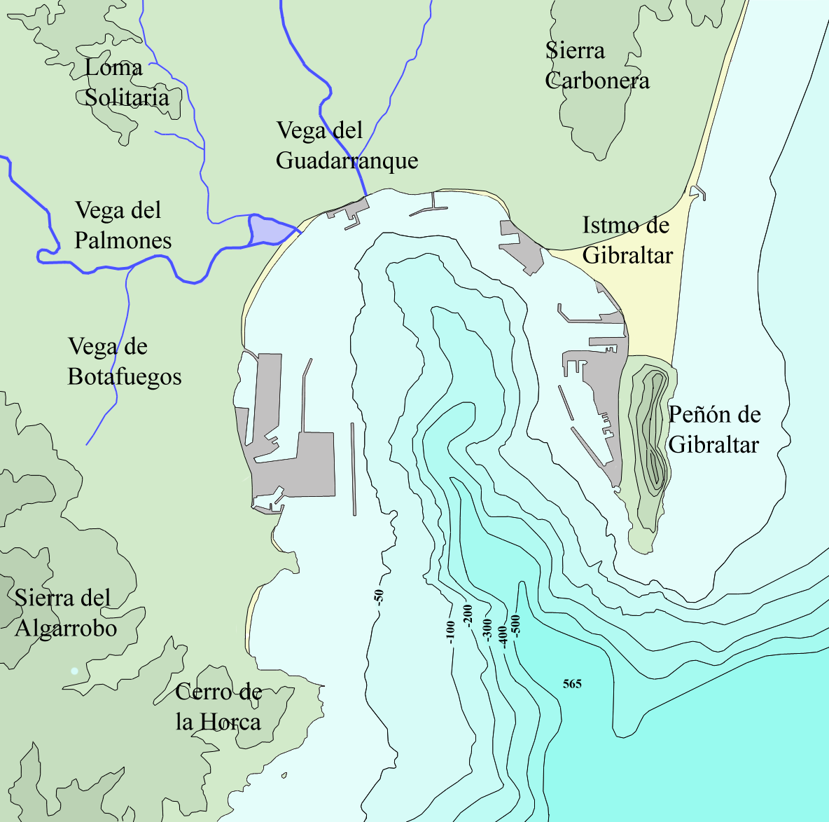 Mapa indicativo del relieve físico y marino de la bahía de Algeciras